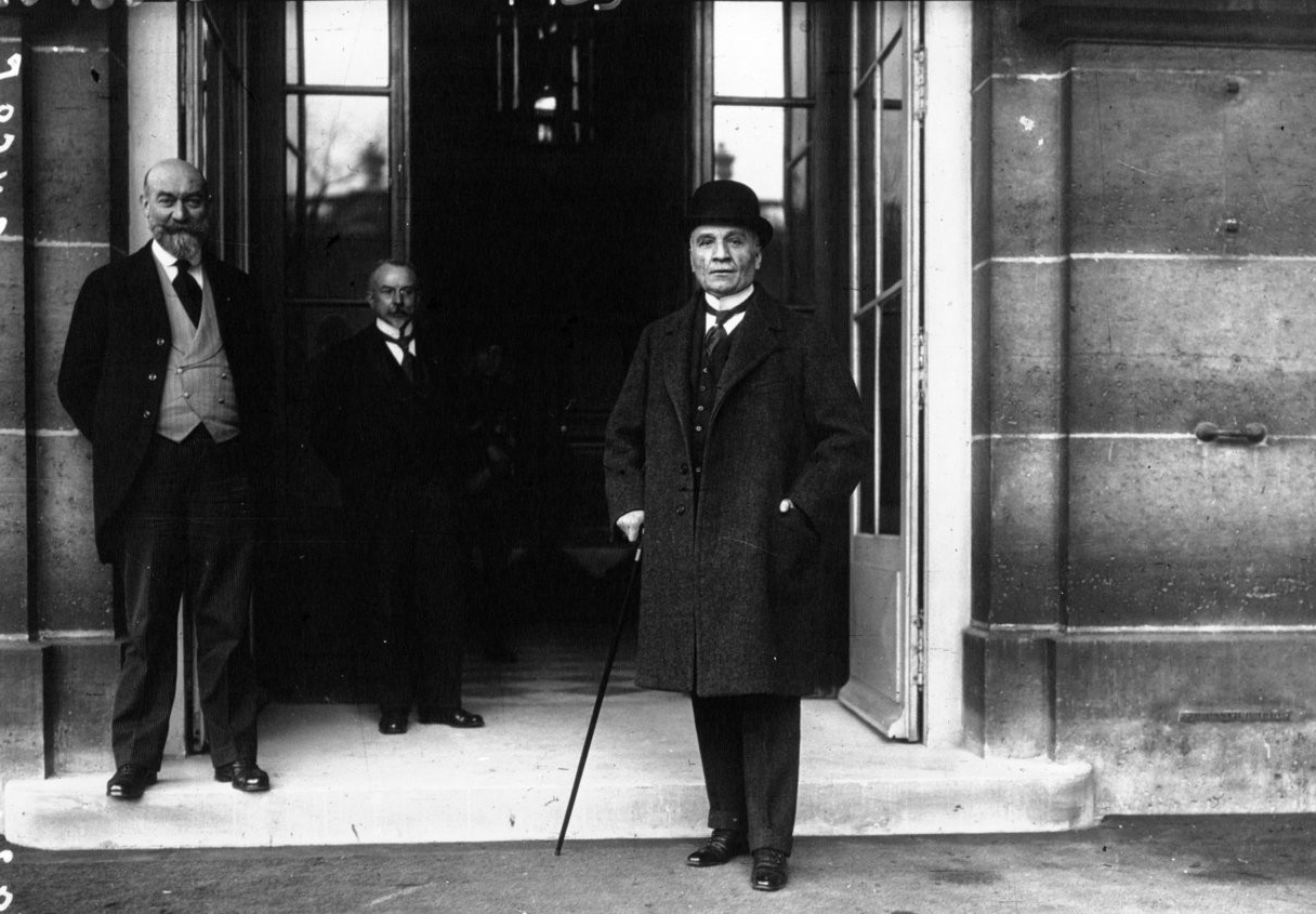 Maurice Paleologue acudiendo a una reunión de embajadores en el minsiterio de Exteriores francés en 1920.